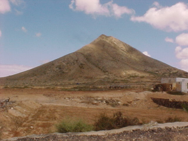 Tindaya